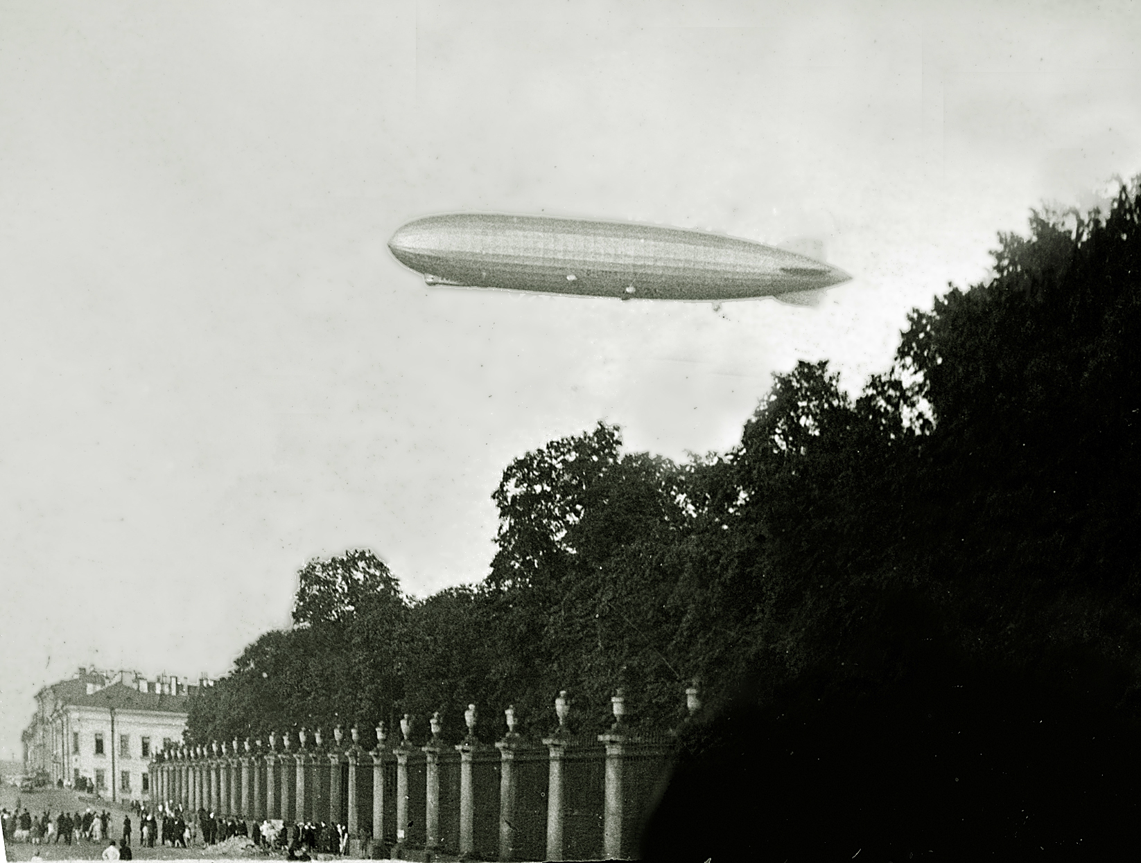 Цеппеллин над Летним садом Татарча/tatarça: Җәйге бакча өстендәге Сәпәллин